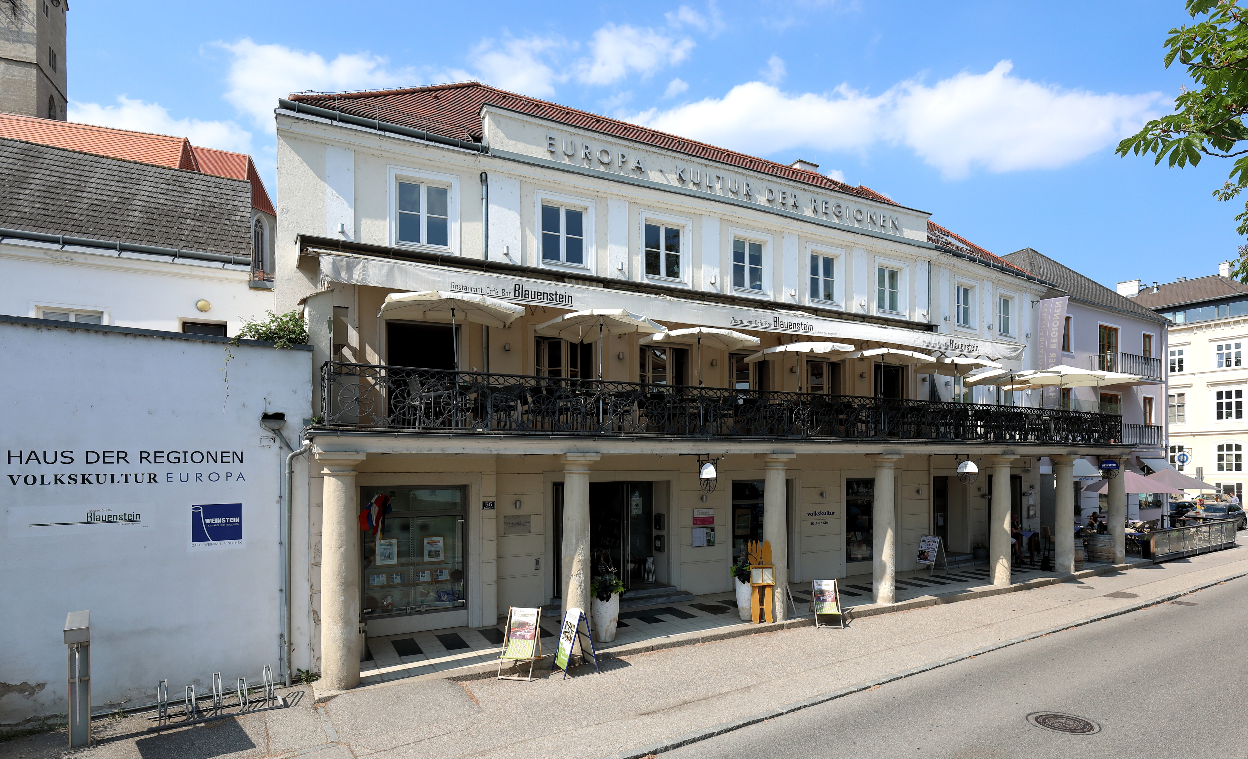 Das Haus der Regionen an der Adresse Steiner Donaulände 56 in Stein an der Donau, ein Stadtteil der niederösterreichischen Stadtgemeinde Krems an der Donau.Das denkmalgeschützte Gebäude wird heute (2018) von Kultur.Region.Niederösterreich genutzt. Der älteste Baukern des ehemaligen Gasthauses reicht in das 15. Jahrhundert zurück.